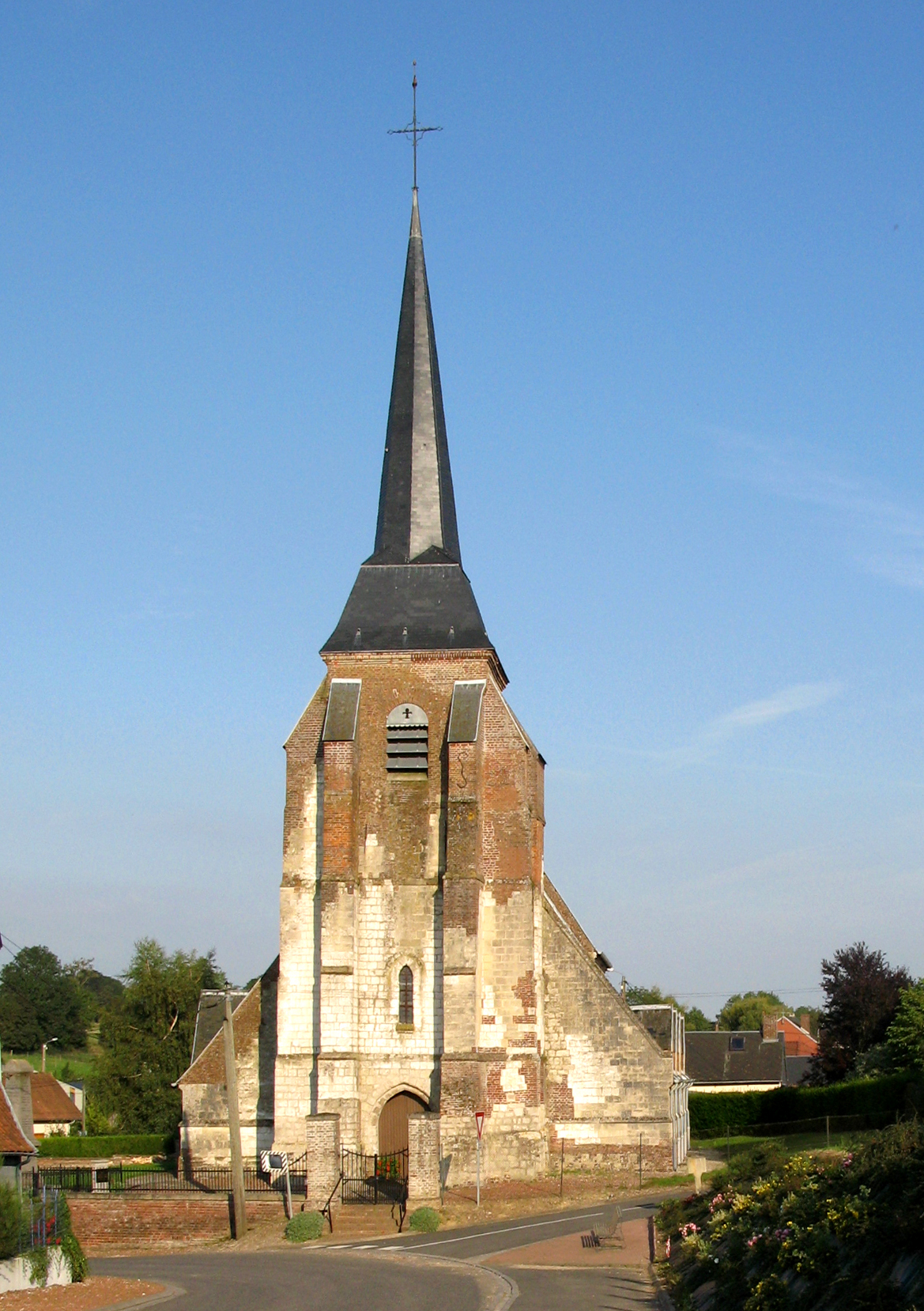 Vismes (Somme, France) - L'église.